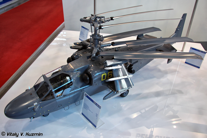 Ka-52